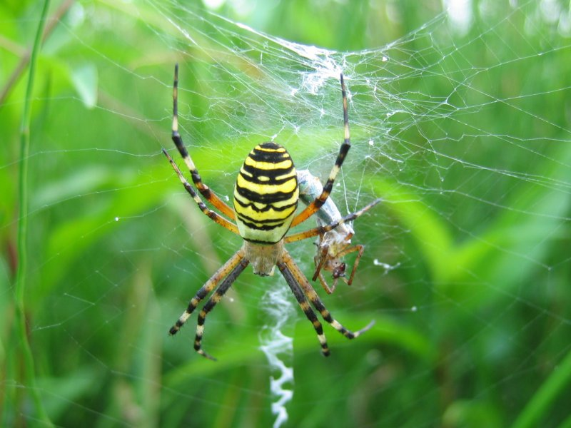 Wespenspinne (Argiope bruennichi), Rostock